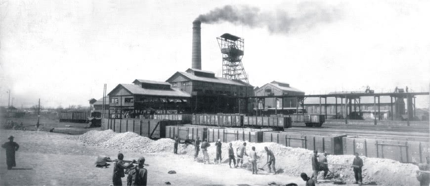 清末洋务运动中开办的开平矿务局唐山矿照片